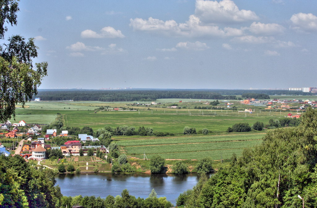 Borovky kurgan